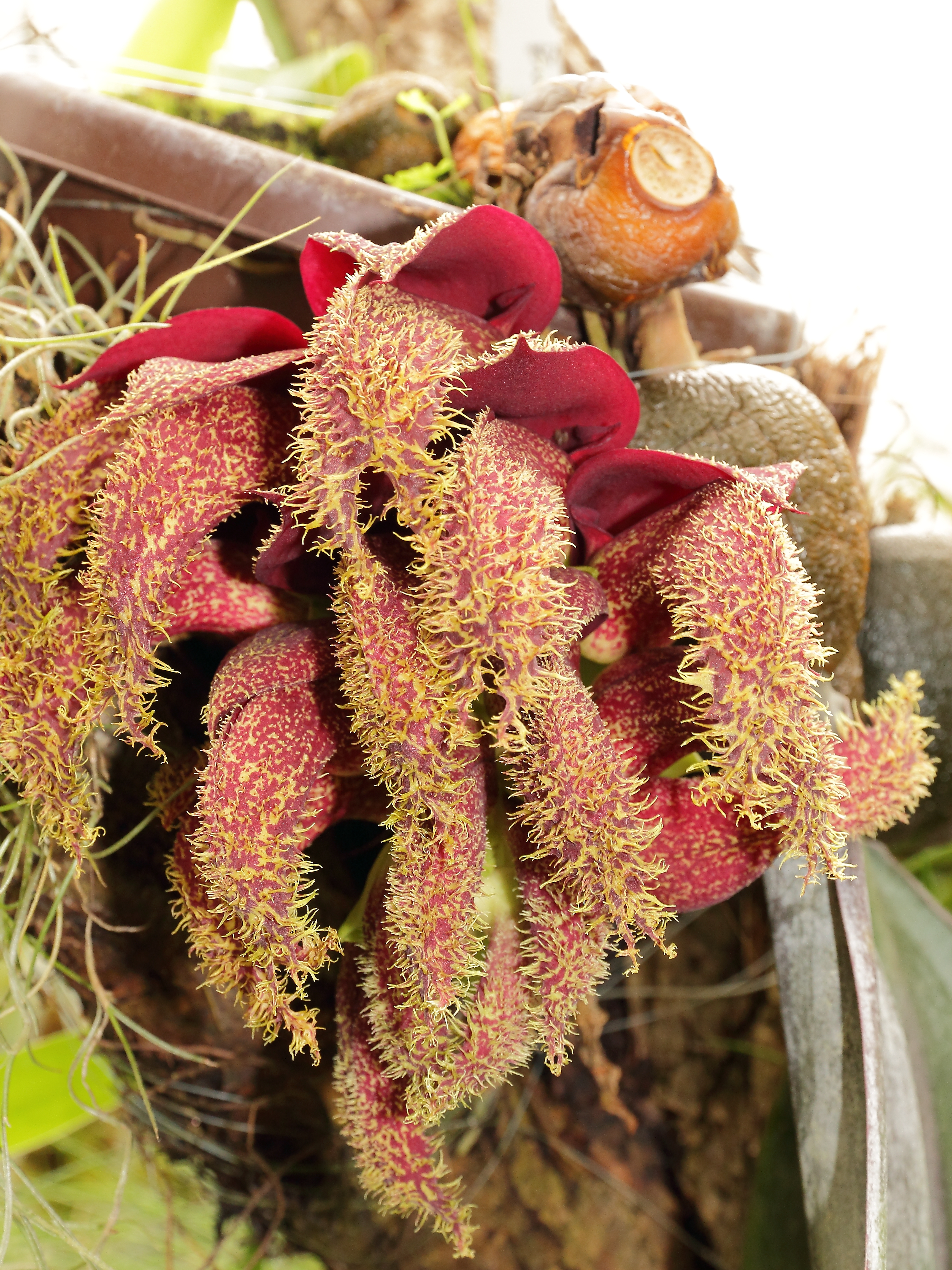 Bulbophyllum phalaenopsis i Göteborgs Botaniska Trädgård.